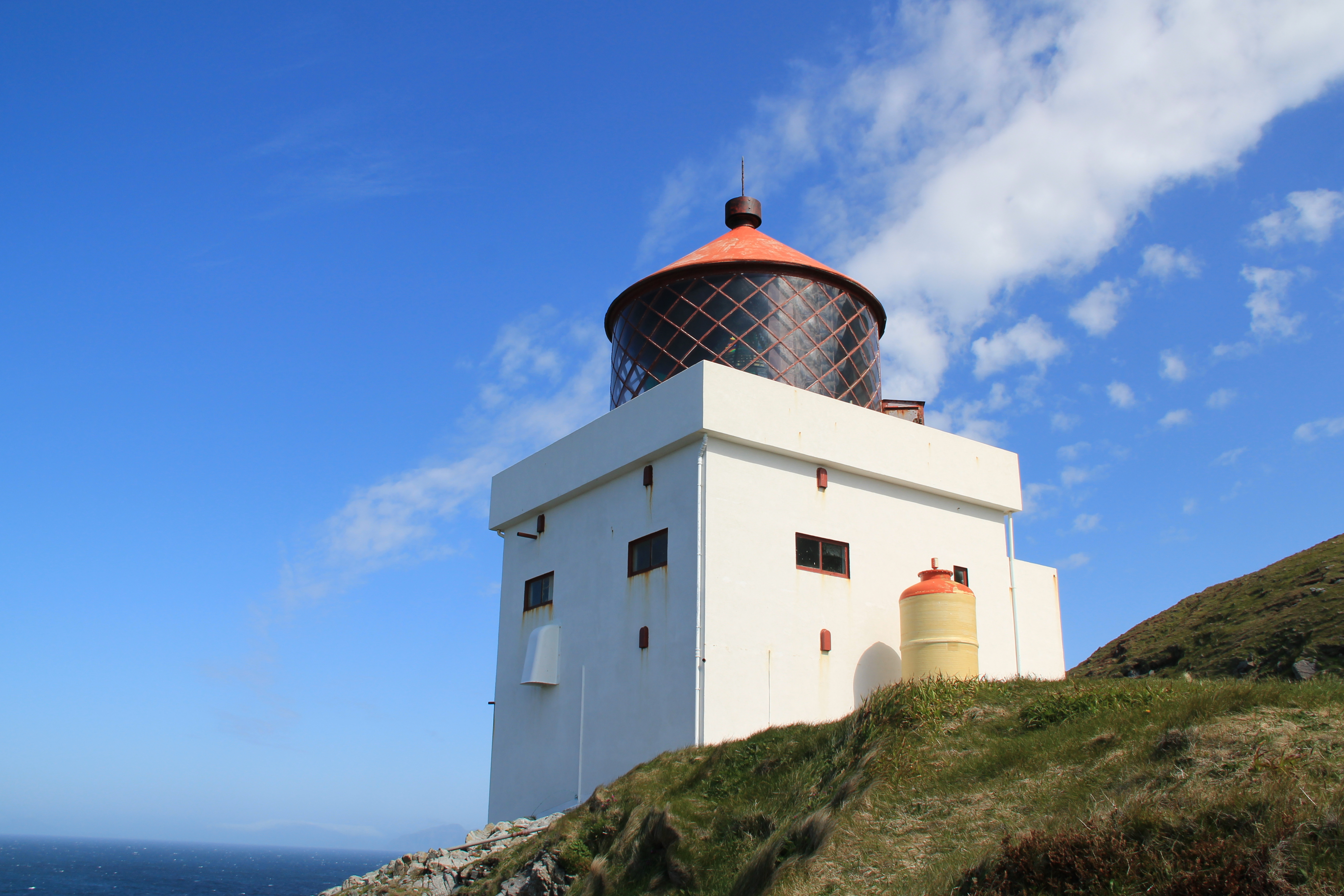 Runde lighthouse, june 2012